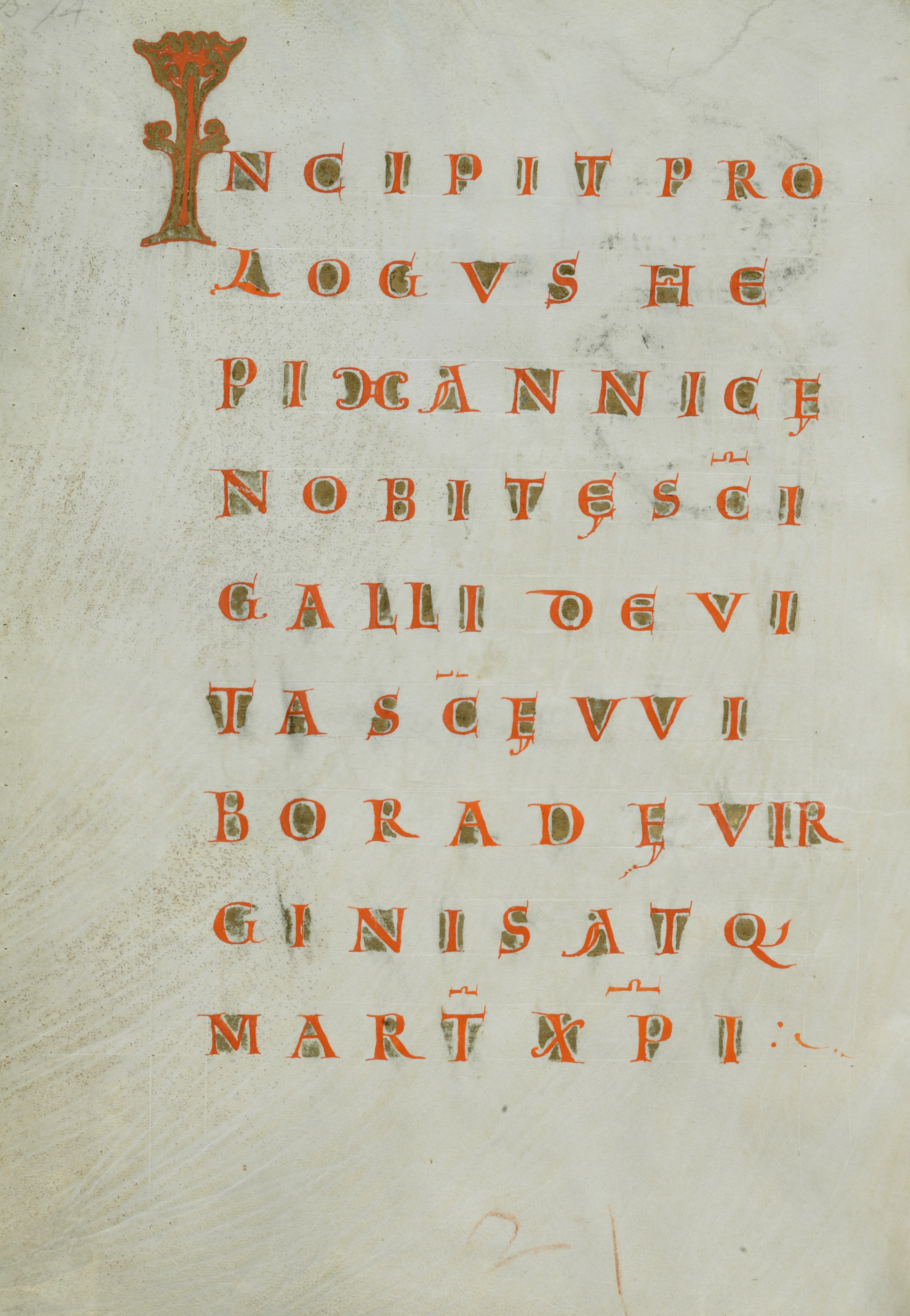 Titelseite des Prologs zu den Vita u. Miracula scae. Wiboradae, Codex 560 der Stiftsbibliothek St. Gallen, S. 374